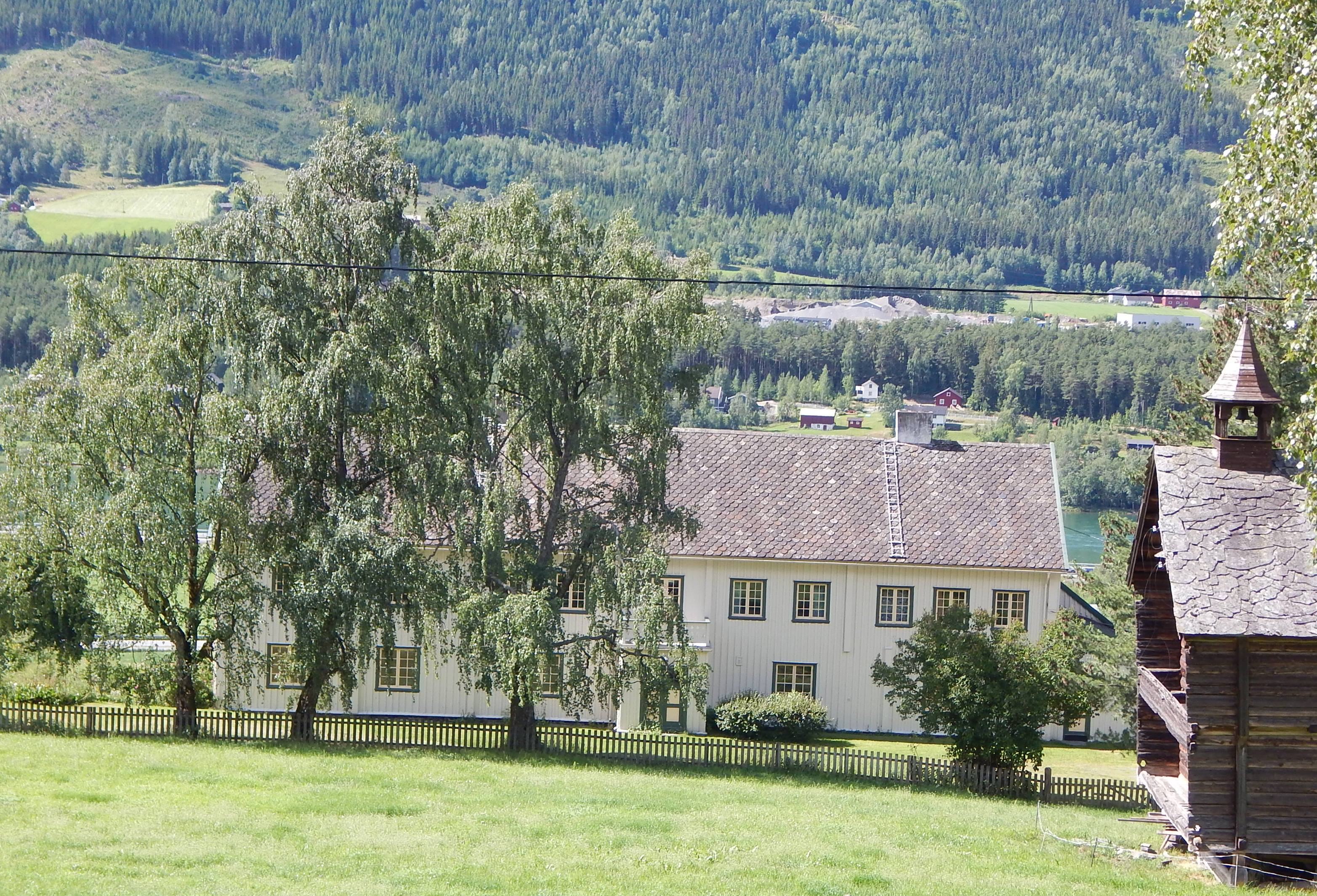 Øyer prestegård